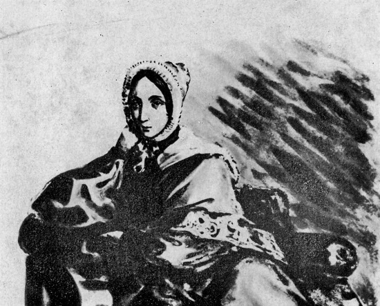 Varvara Bakhmetev-Lopuchin auteur Mikhaïl Lermontov